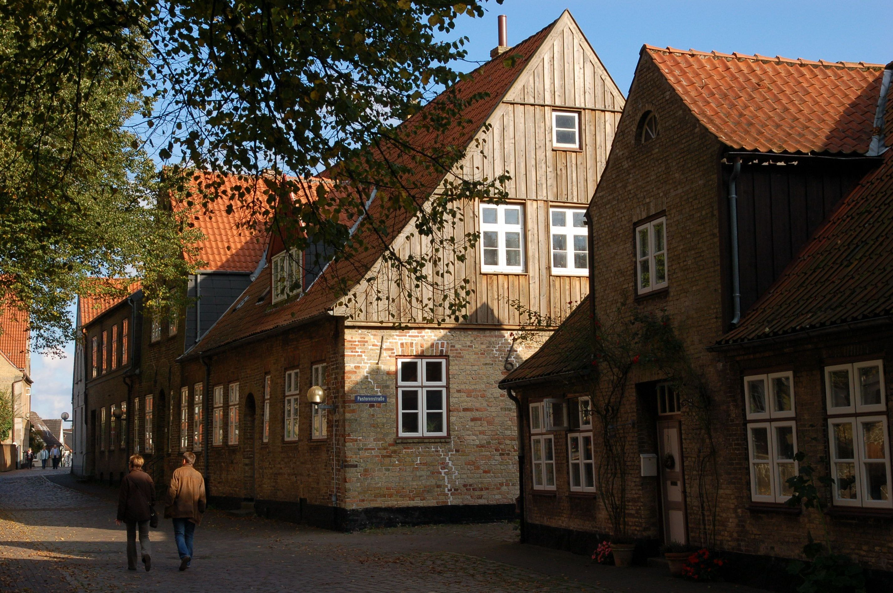 Süderdomstraße 11 und 13 in Schleswig, Germany